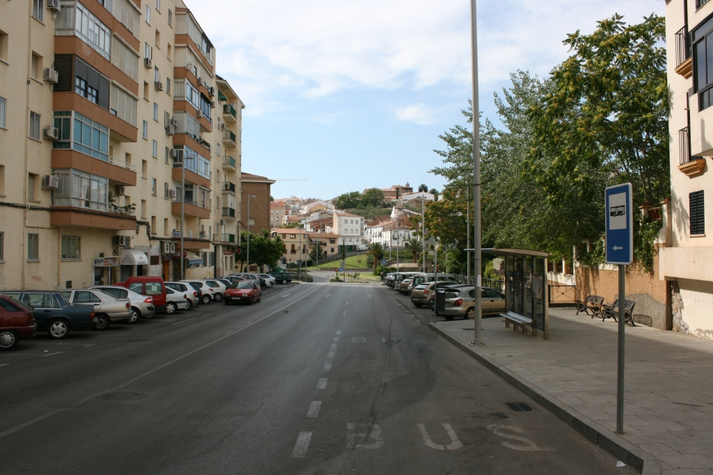 Ronda de San Francisco, Cáceres, España. Parada de autobús junto al museo Casa Pedrilla.